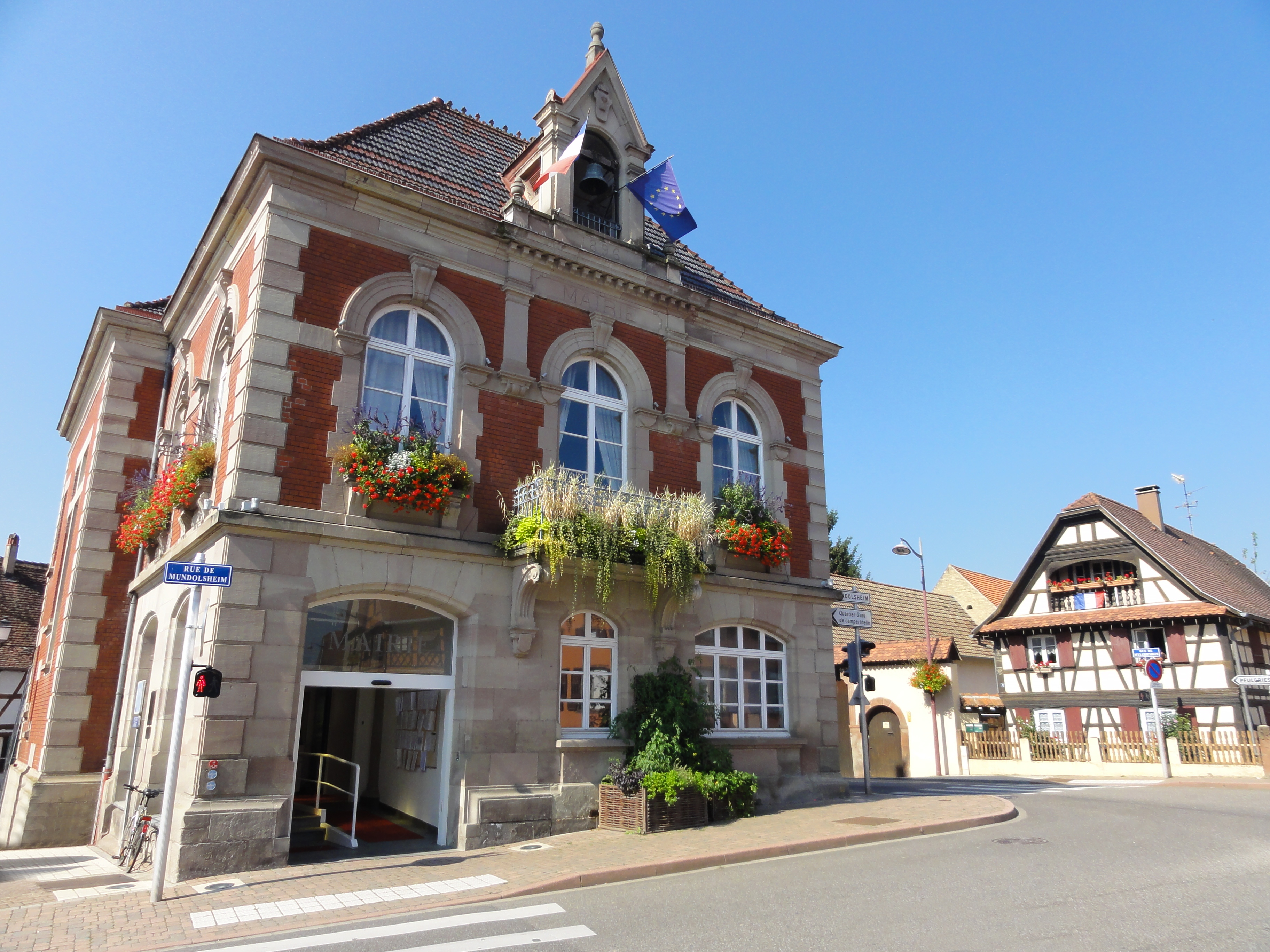 Alsace, Bas-Rhin, Lampertheim, Mairie (1896): .